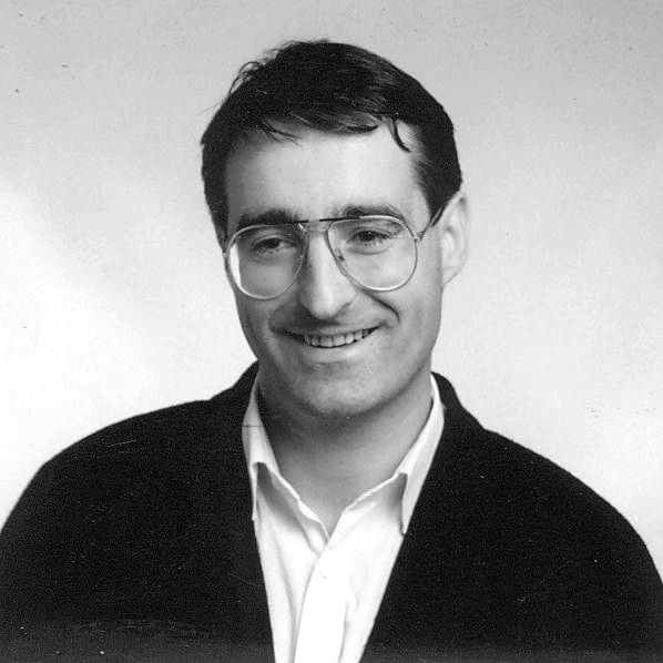 Jan Henry T. Olsen, Ap-politiker.